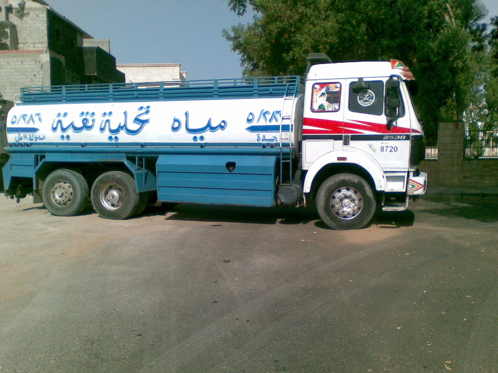 ജിദ്ദയിൽ ജലവിതരണം നടത്തുന്ന നാഷണൽ വാട്ടർ കമ്പനിയുടെ ടാങ്കർ.